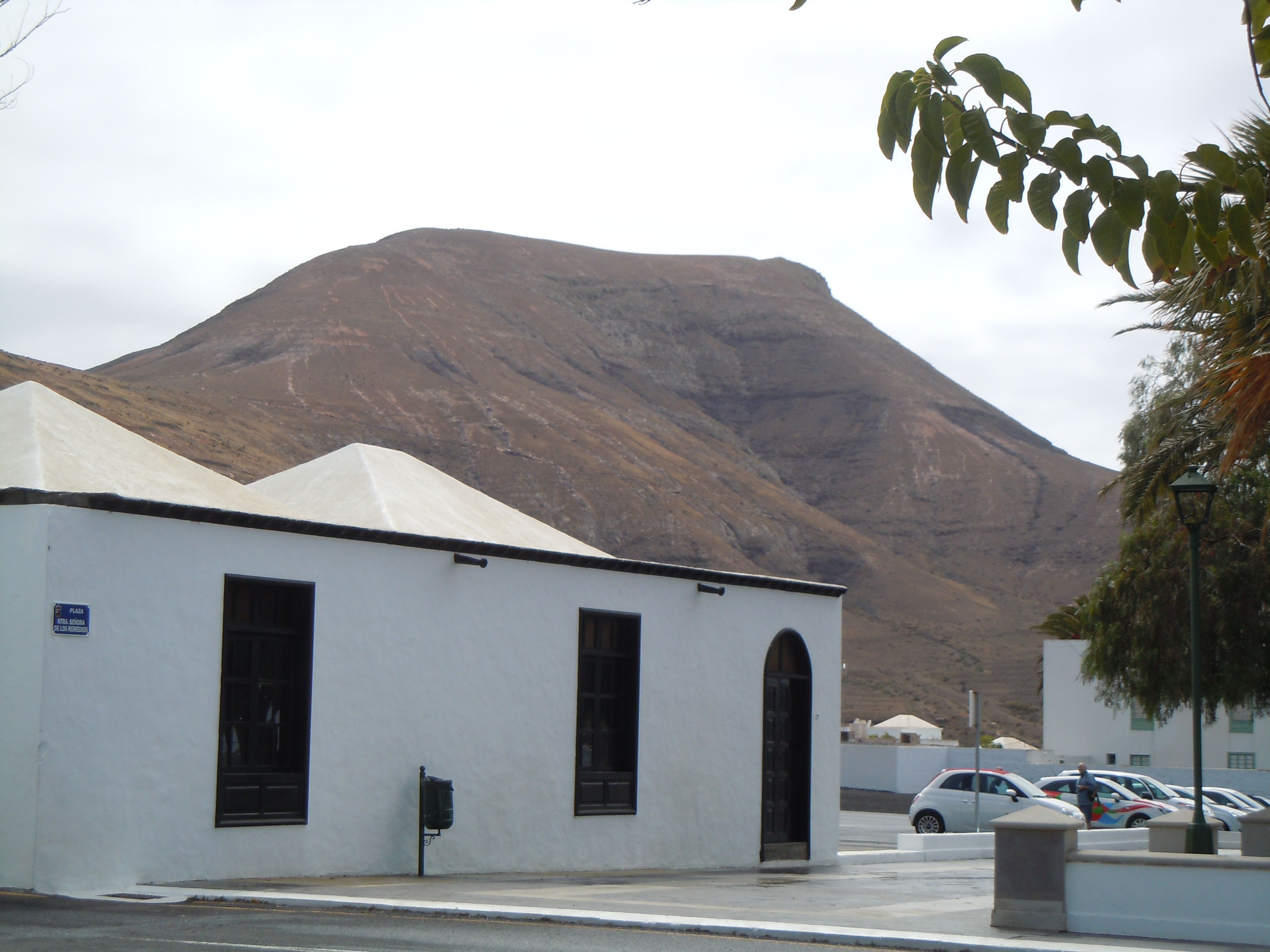 Montaña de la Cinta depuis Yaiza. Calle el Cagancho